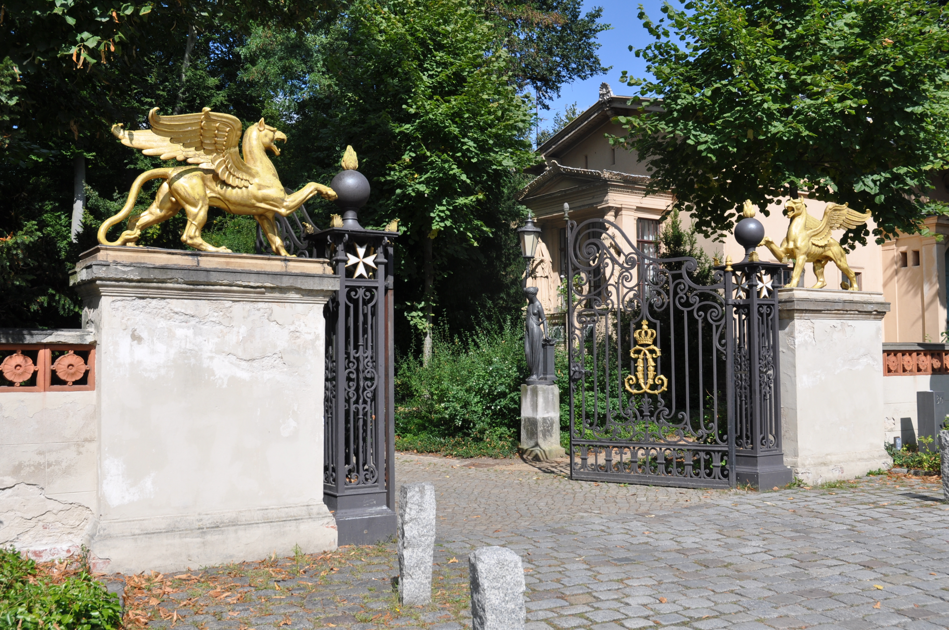 Hauptportal des Parks Klein-Glienicke